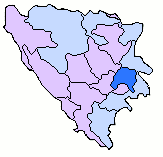 BosniaRegion SarajevoRomanija